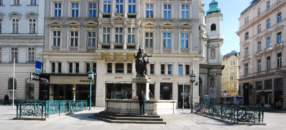 Die denkmalgeschützte unterirdische Bedürfnisanstalt am Graben in Wien